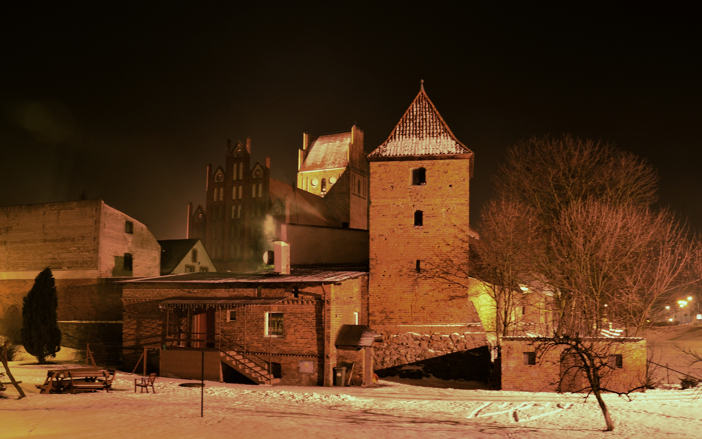 Mury obronne Golubia, w tle kościół poewangelicki